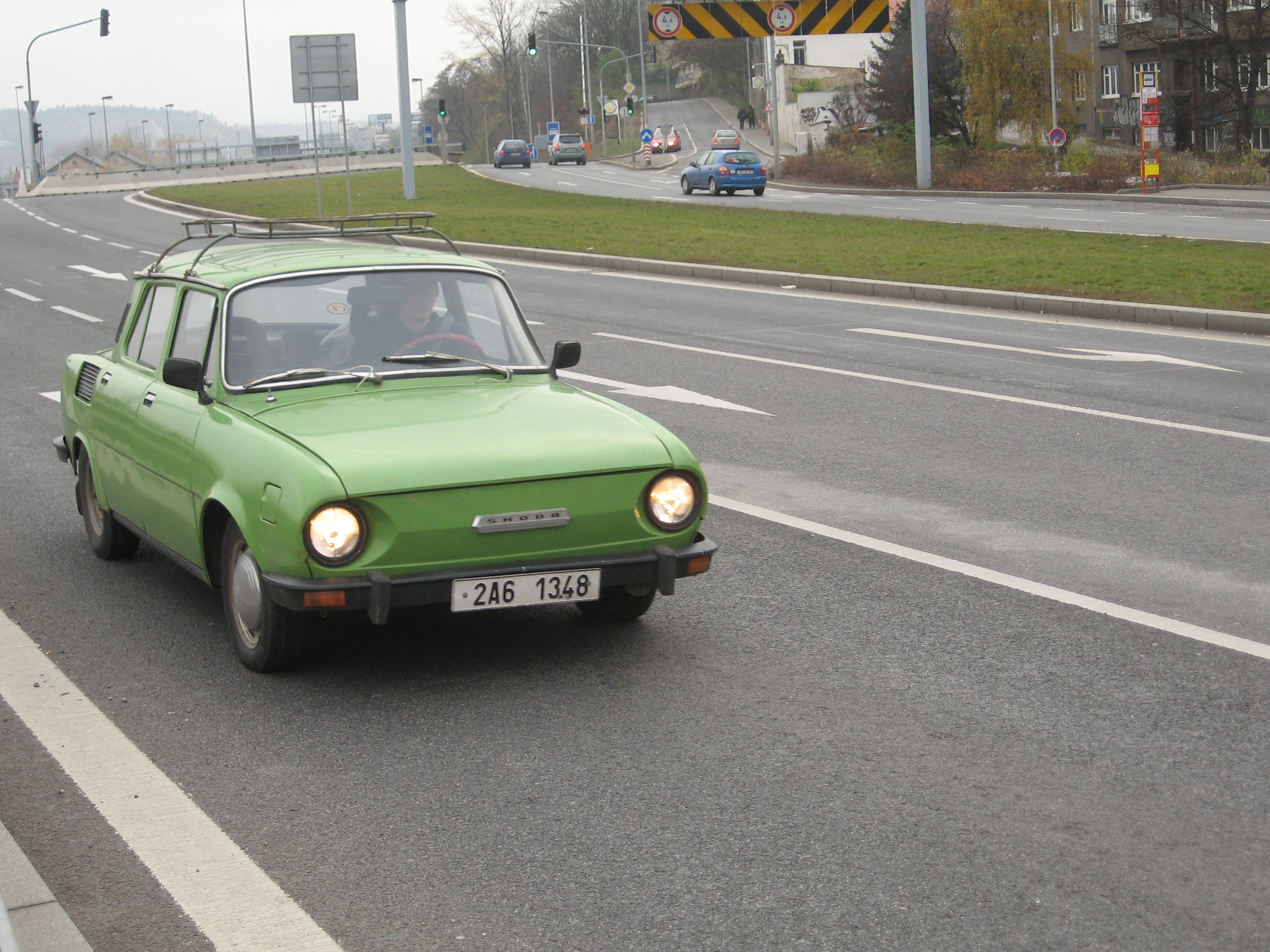 Škoda 100 v Praze na Radlické ulici